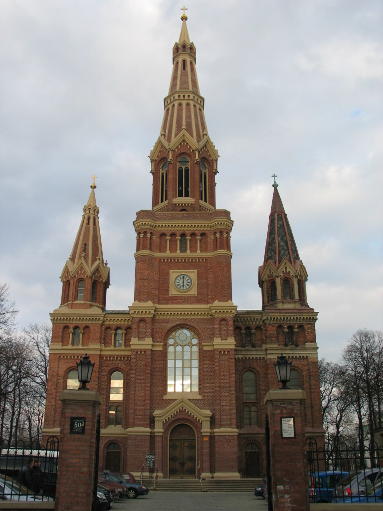 Kościół oo. Jezuitów w Łodzi